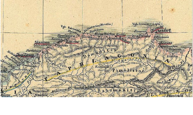 Antikçağ Kaynaklarında ve Sonraki Seyahatnamelerde Kastamonu Kıyıları